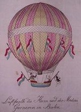 Luftfahrt des Herrn und der Madame Garnerin in Berlin, kolorierter Kupferstich aus dem Nachlass meiner Schwiegermutter Erika Meyer, eine Verwandte des Christian Friedrich August Reinhardt (1742-1814), Hof- und Justiz-Rath beim König in Dresden.